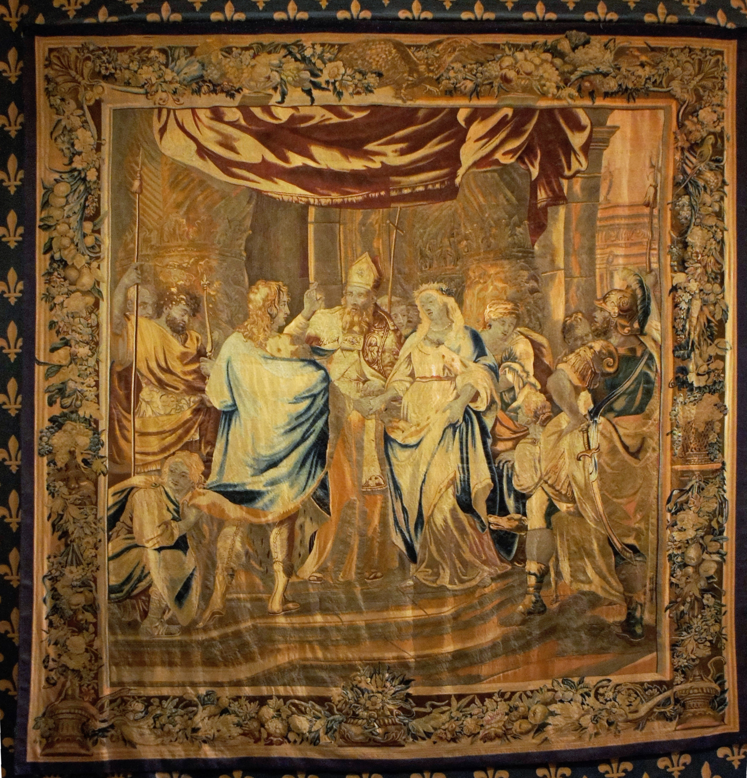 Le_mariage_de_Clovis_et_Clothilde, tapisserie de lisse, dépôt du mobilier de France.